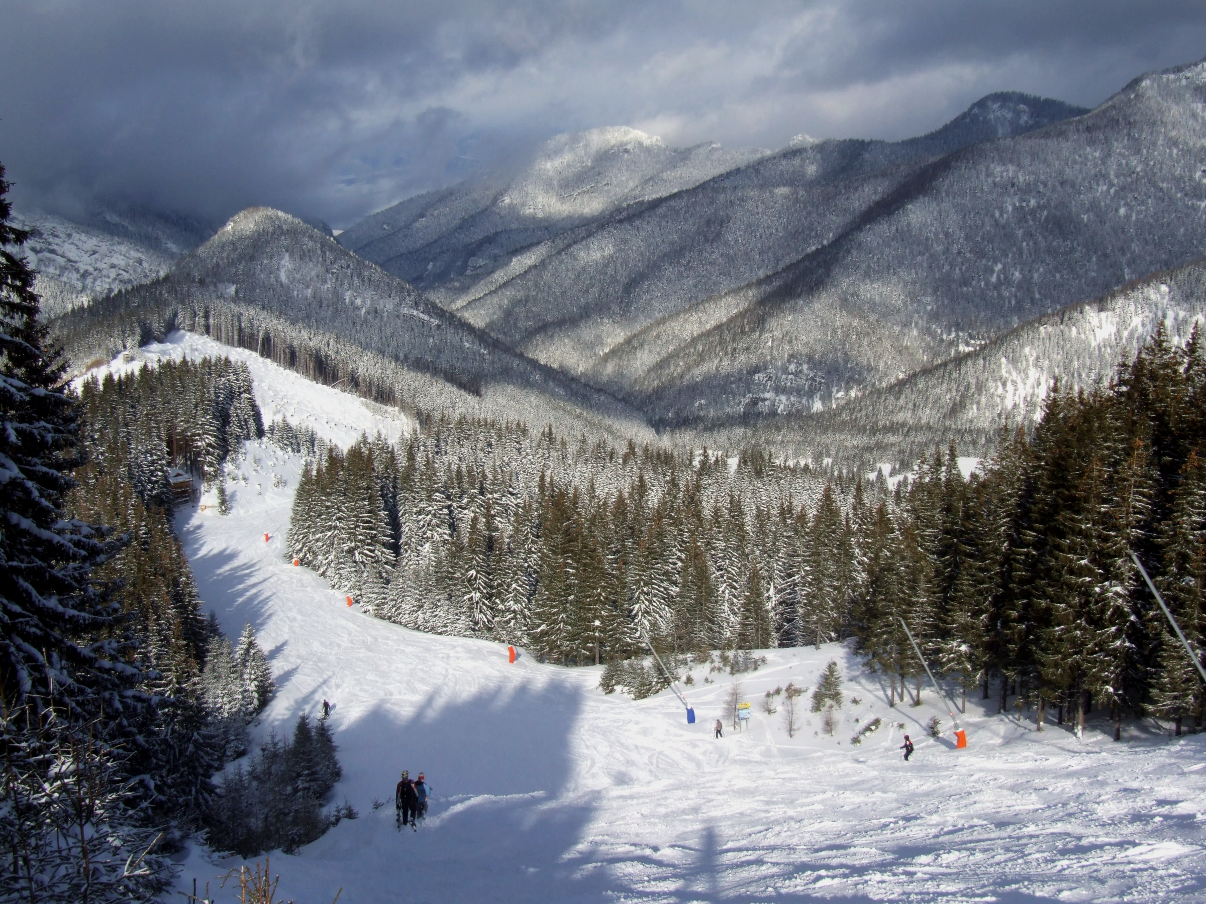 Jasná Ski Resort - sjezdovka nr 12